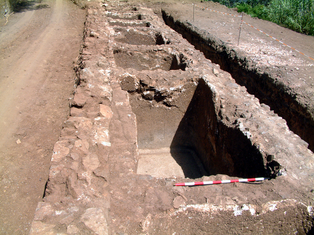 Piletas de opus signinum de la factoría de garum y salazones